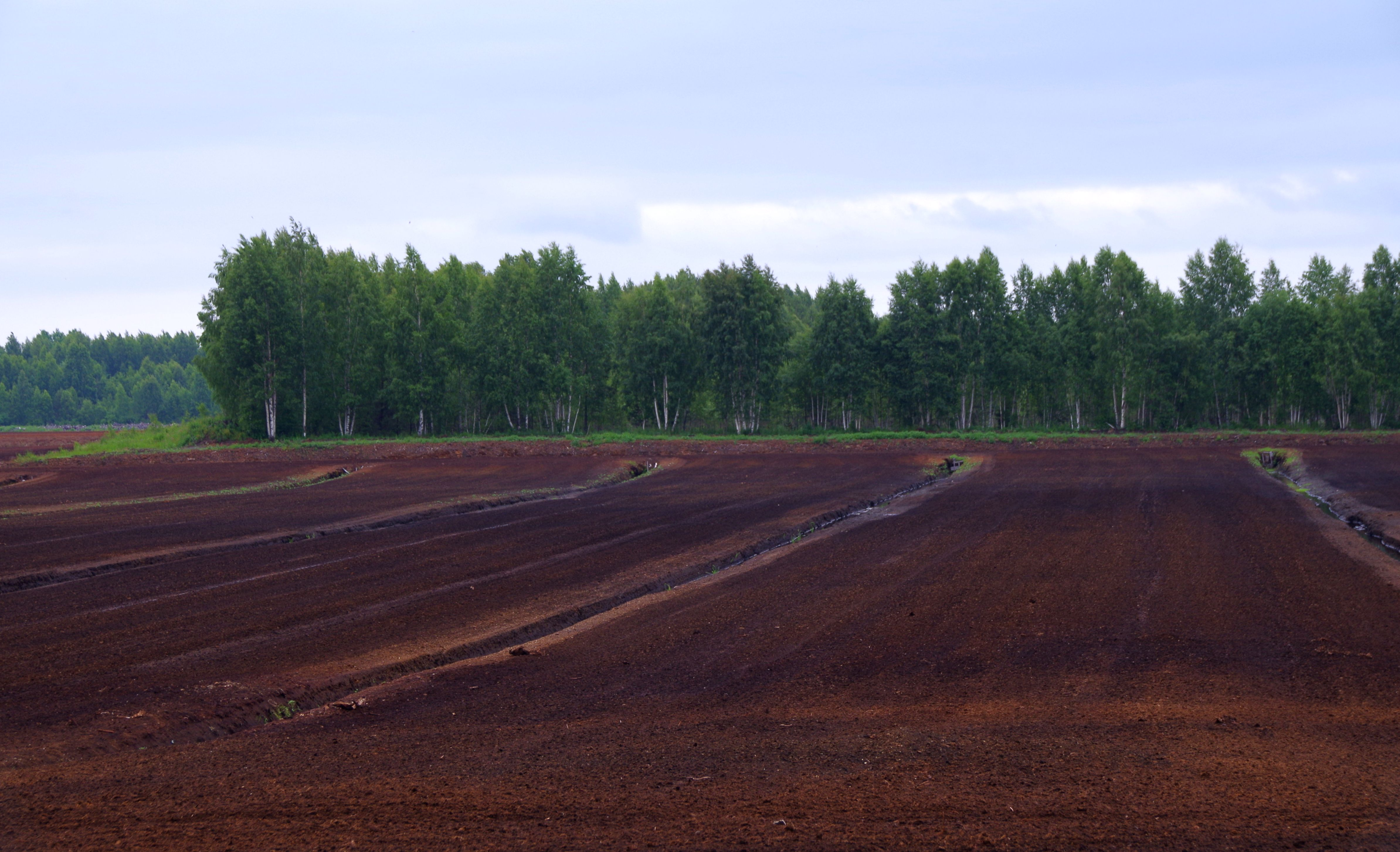 Rae küla, Rae vald, Harjumaa